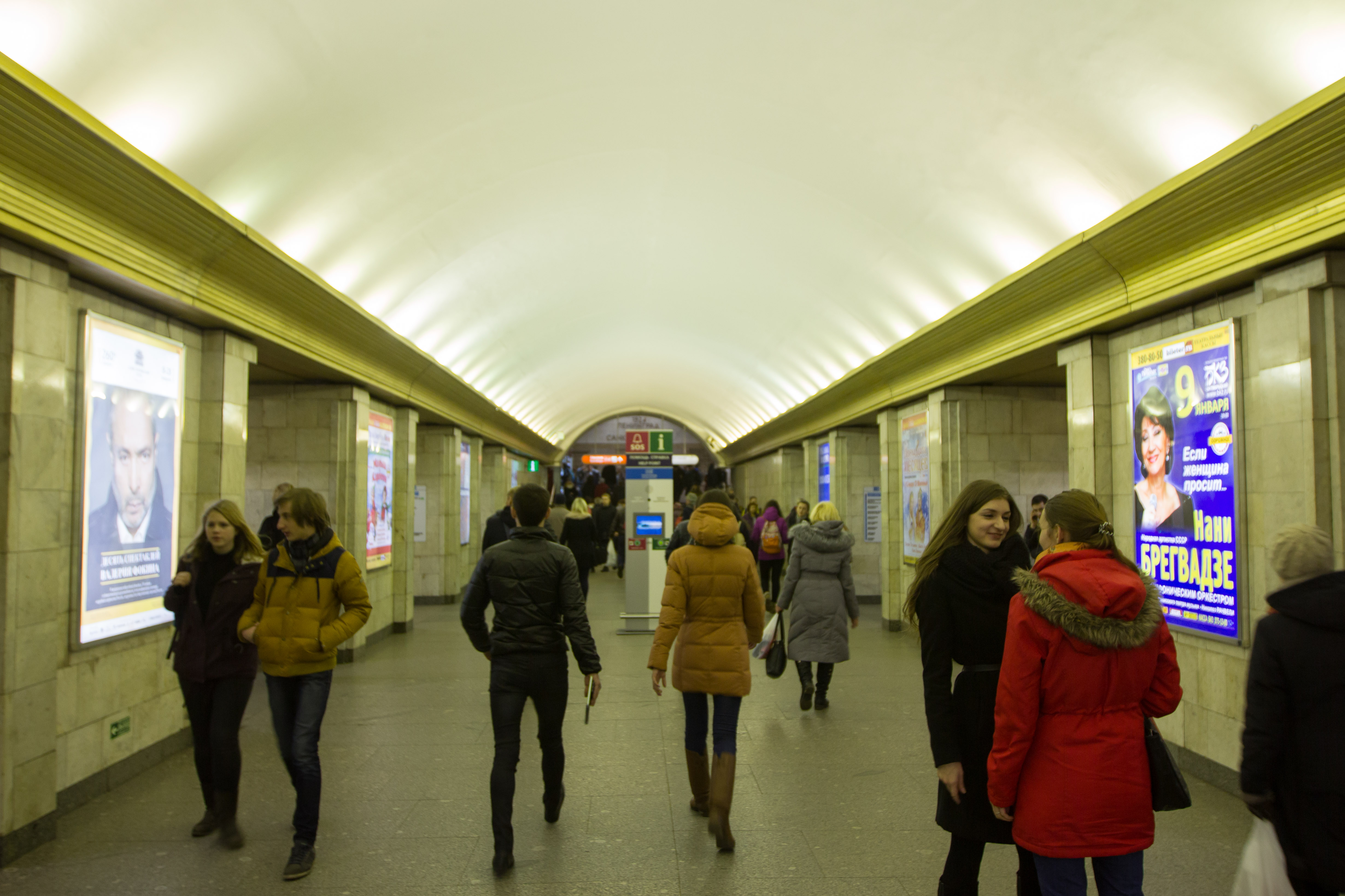 Vue de la station de métro Sennaya Ploshad (Ligne 2) du métro de Saint-Pétersbourg (Russie)